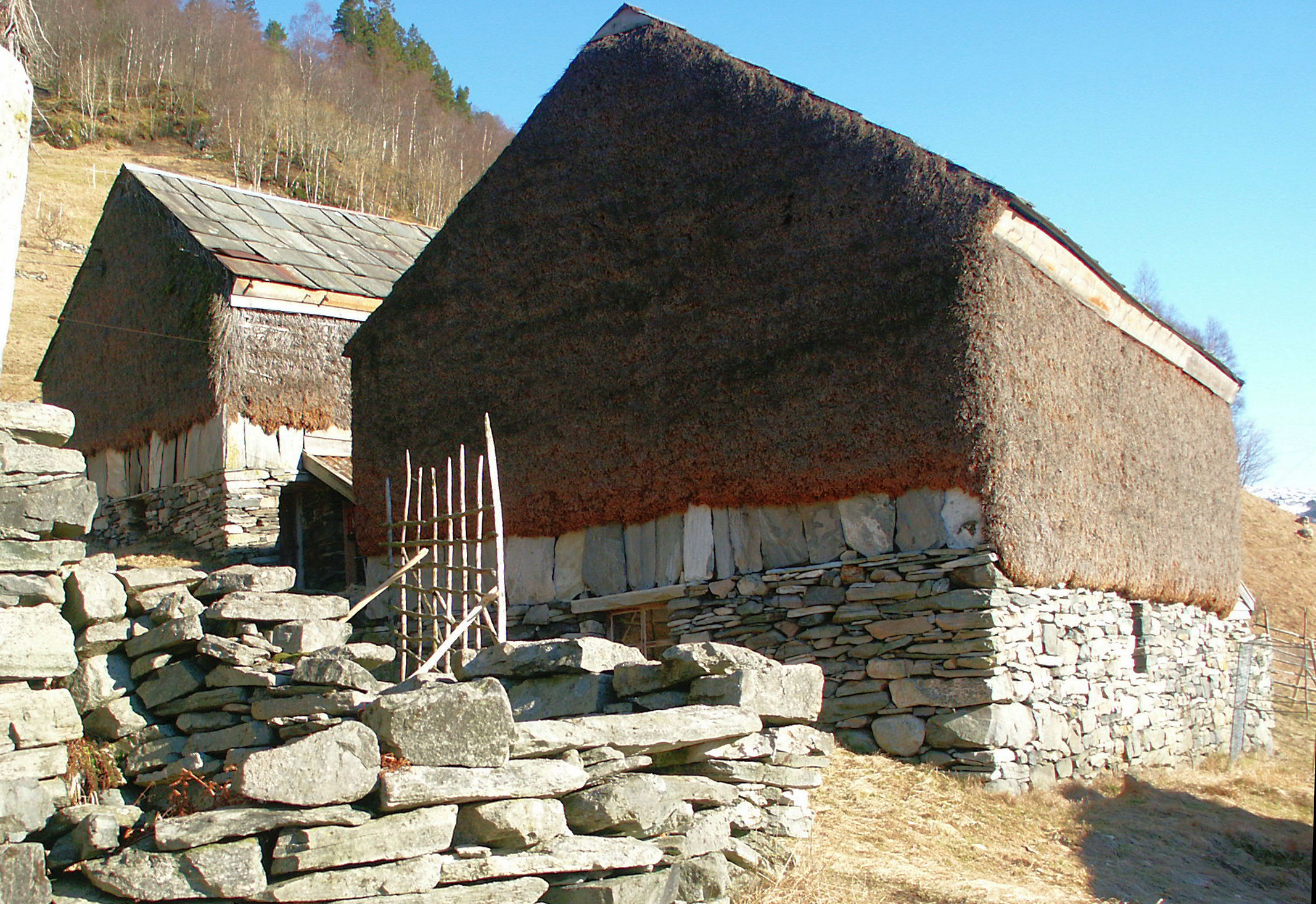 Havretunet, Osterøy Kommune, Hordaland